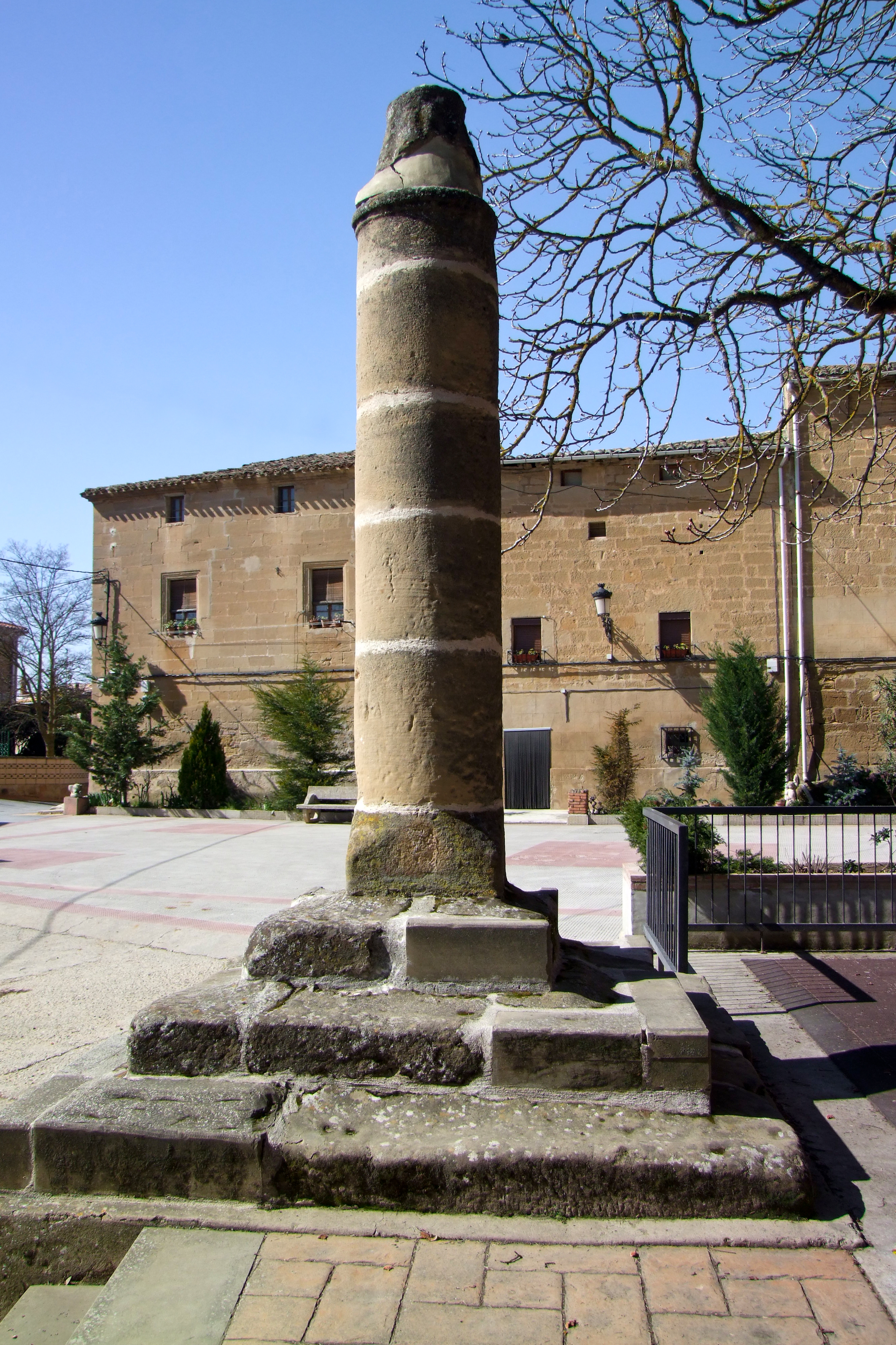 Rollo jurisdiccional en la localidad de Villalba de Rioja, La Rioja - España